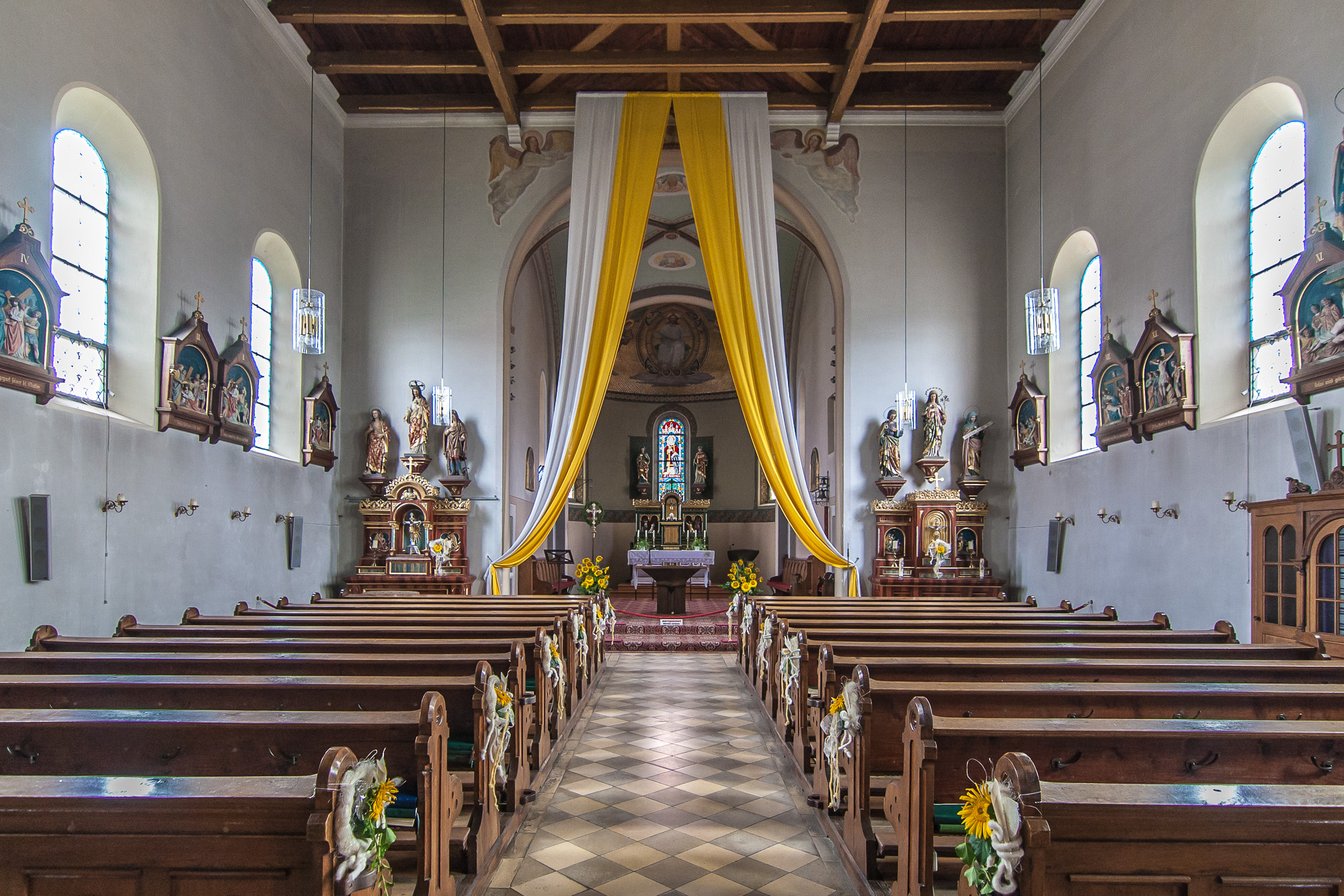 Kirche St. Laurentius; 1887-89; mit Ausstattung.This is a photograph of an architectural monument.